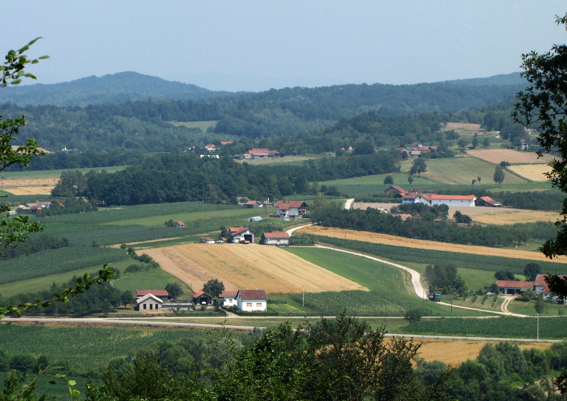 Ситнеши (Србац)